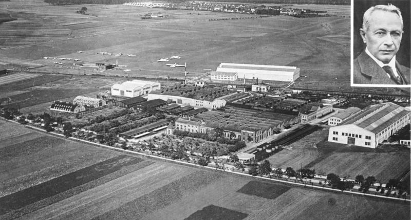 ADN-ZB-Archiv Deutschland 1928 Junkers-Werke in Dessau und Porträt des Begründers der Werke, Prof. Junkers. 22393-28 [Scherl Bilderdienst]